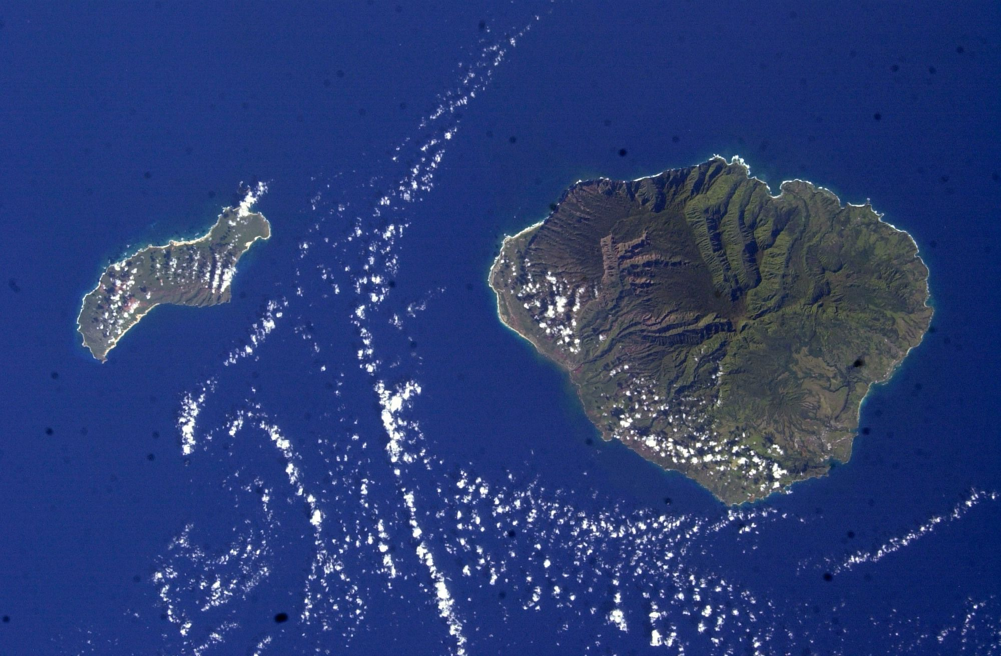 Hawaii Archipel. Nihauu "the forbidden Island" rechts neben dem größeren Kauai. Achtung: Auf diesem Bild ist der Norden unten.